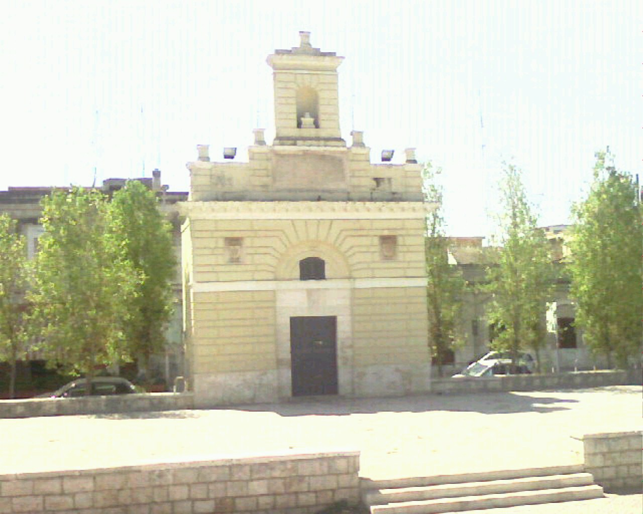 cisternone-Modugno (bari)-italy